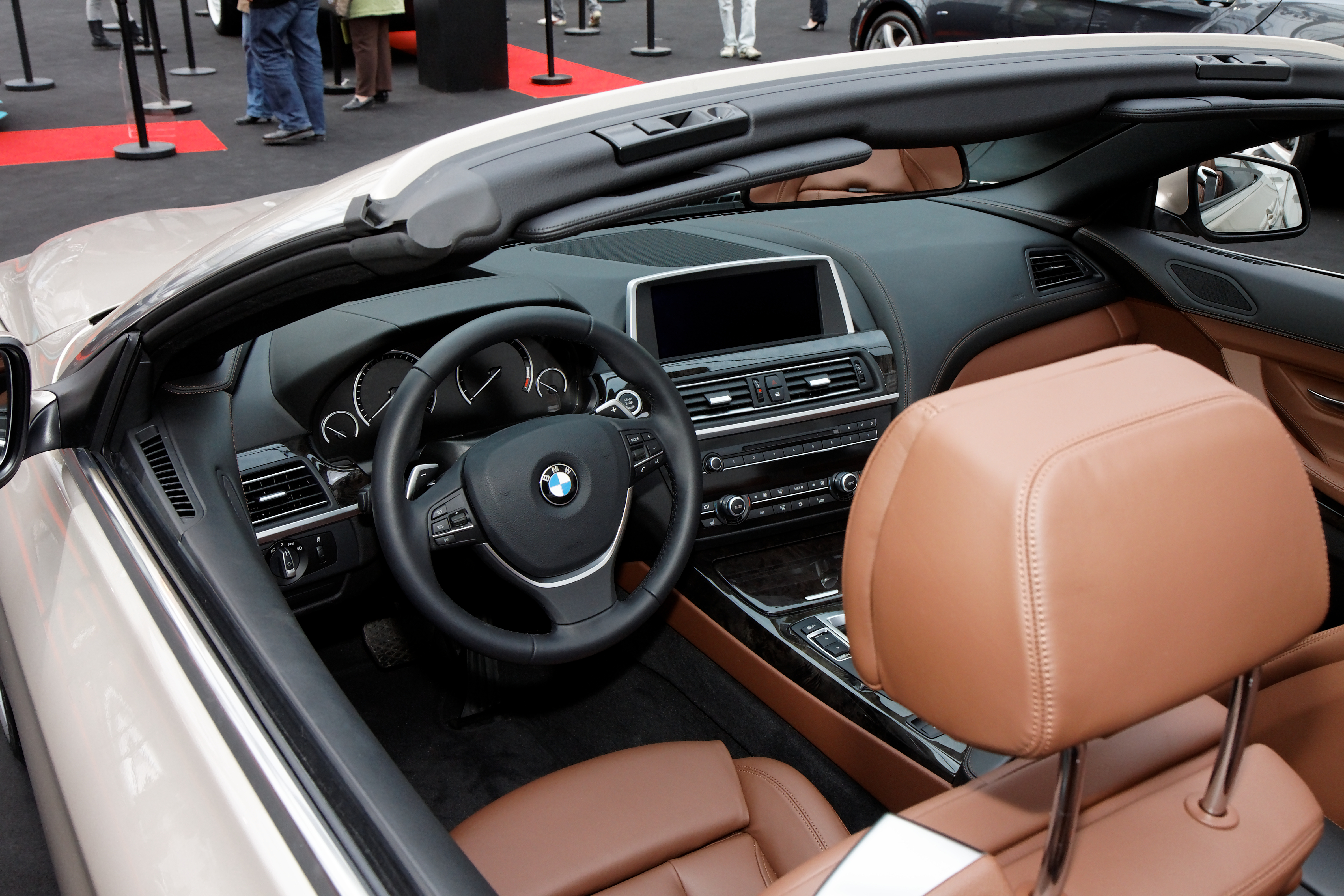 La BMW 650i exposée devant le dôme des Invalides lors du festival automobile international 2011.